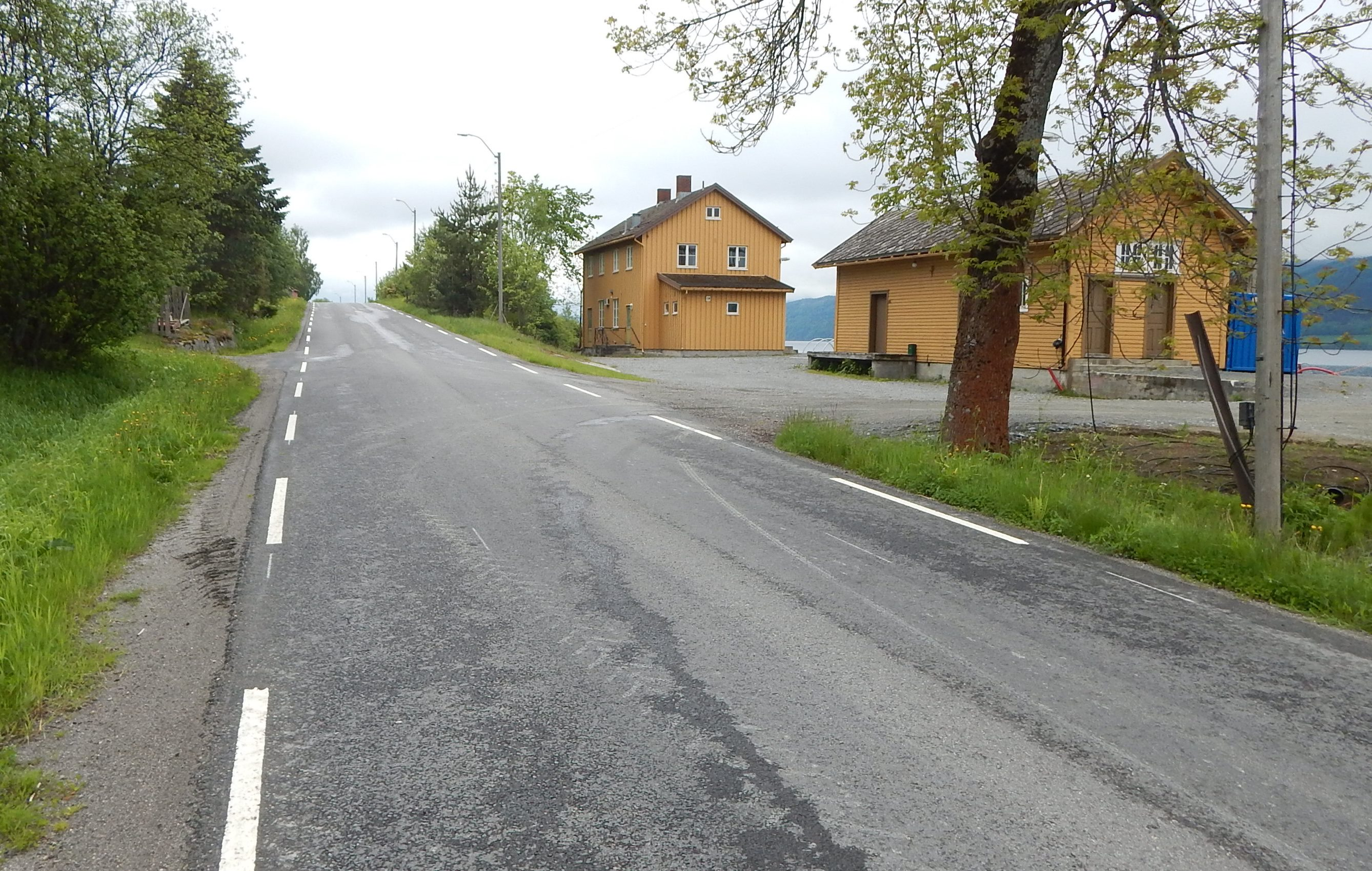 Fylkesvei 512 forbi Morsogen stasjon